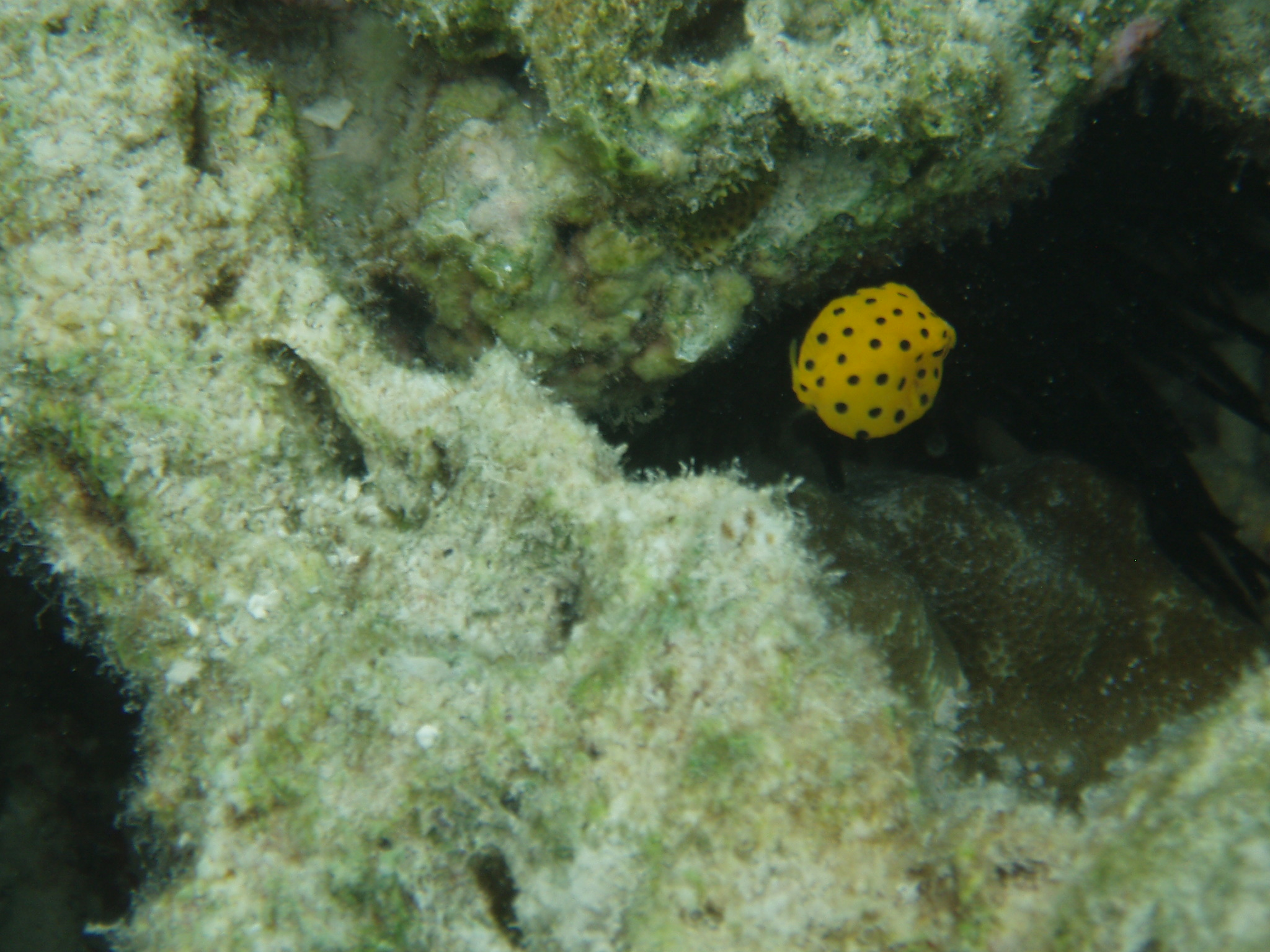 Forme juvénile de poisson coffre 'Ostracion cubicus'